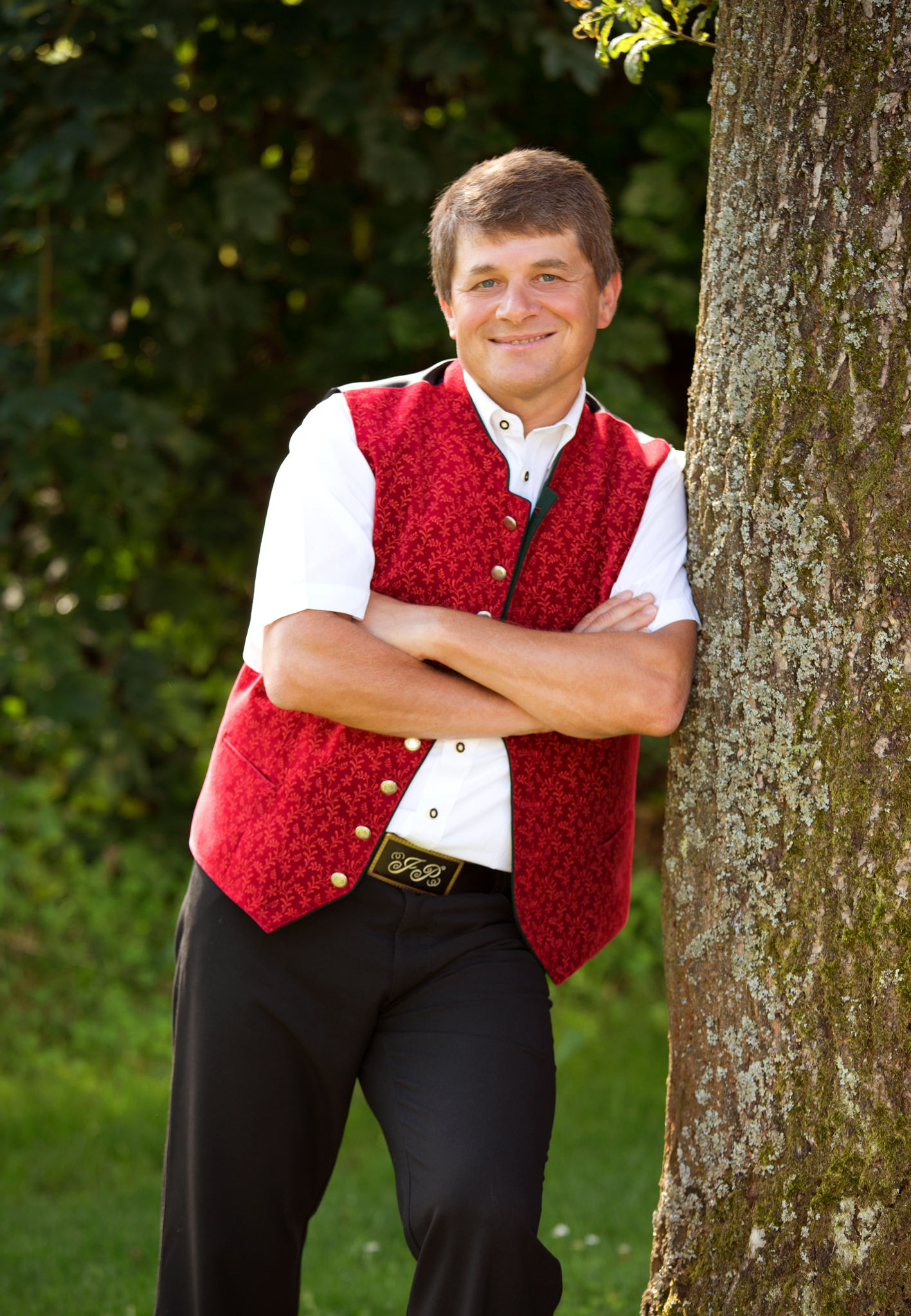 Josef "Bäff" Piendl lehnt an einem Baum